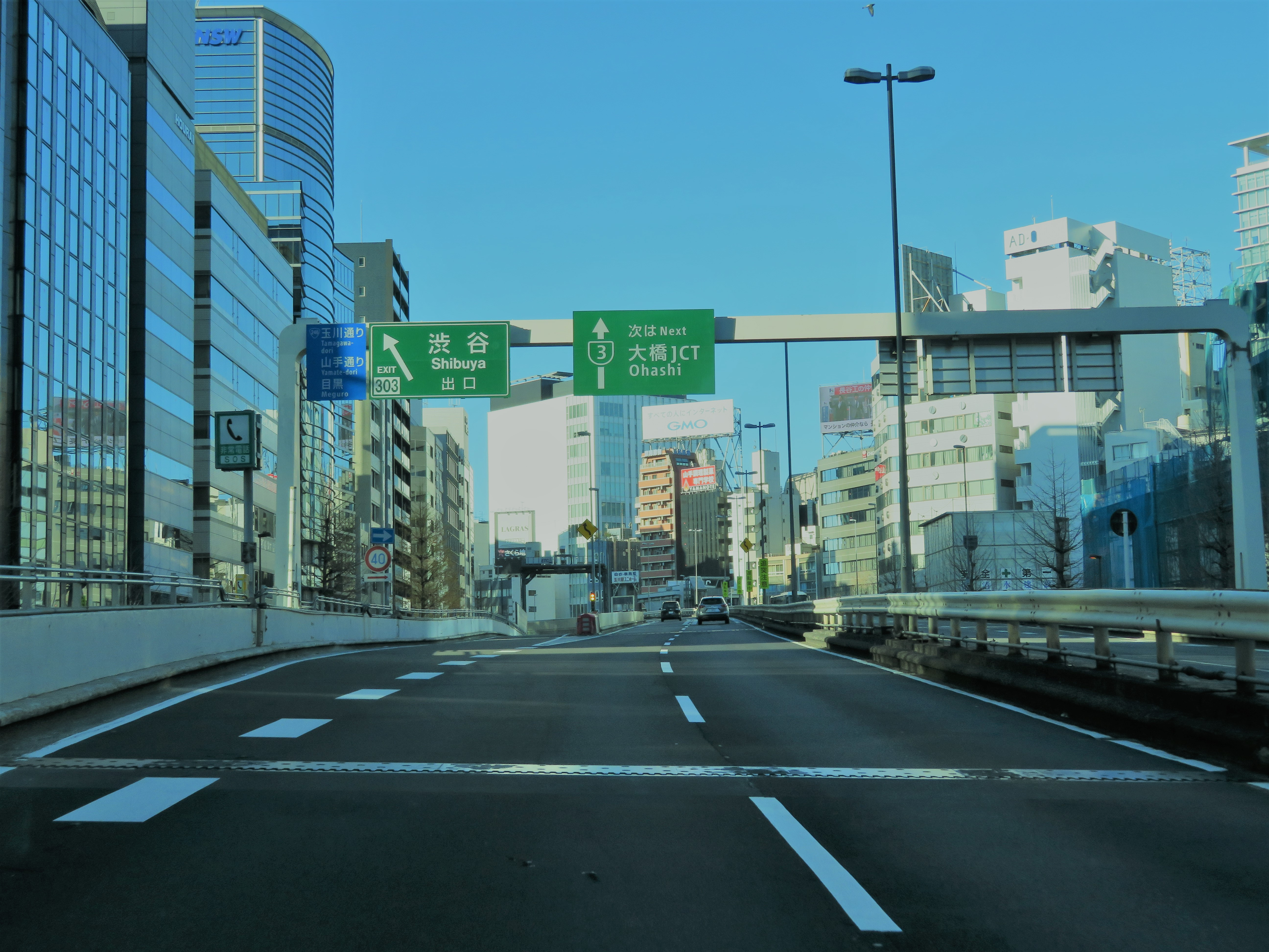 首都高速道路3号渋谷線渋谷下り出口付近